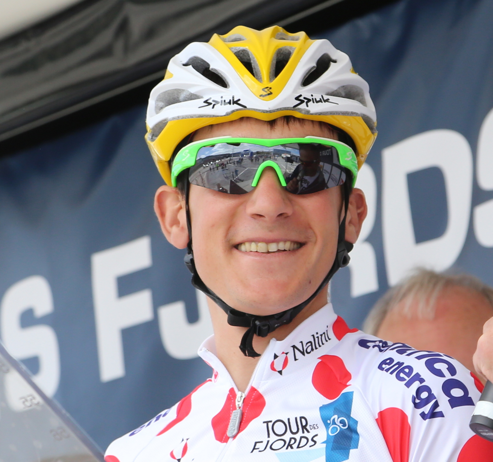 Amets Txurruka under Tour des Fjords 2014